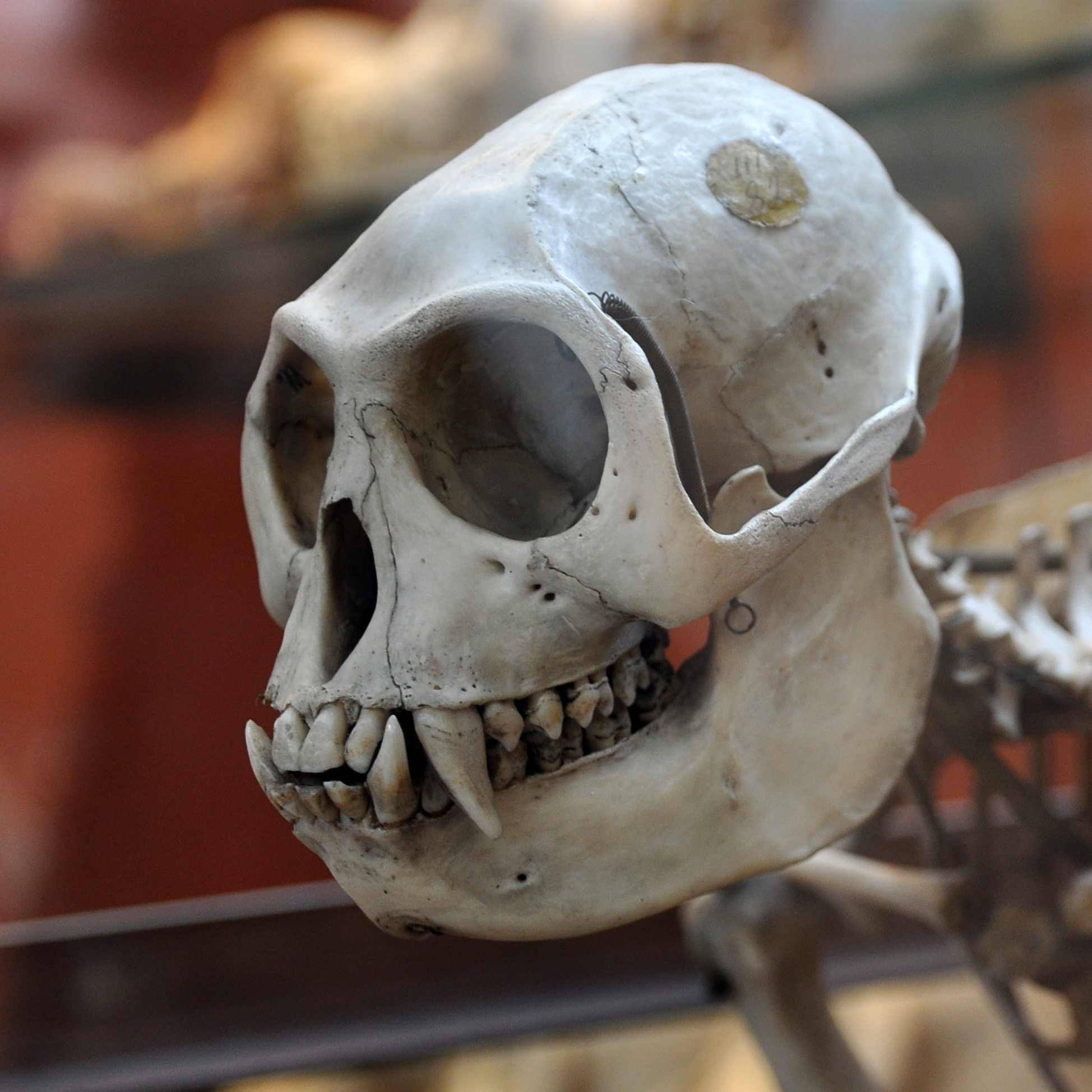 Crâne de Trachypithecus ( Trachypithecus maurus ), Museum D'Histoire Naturelle de Paris, galerie d'anatomie comparée.